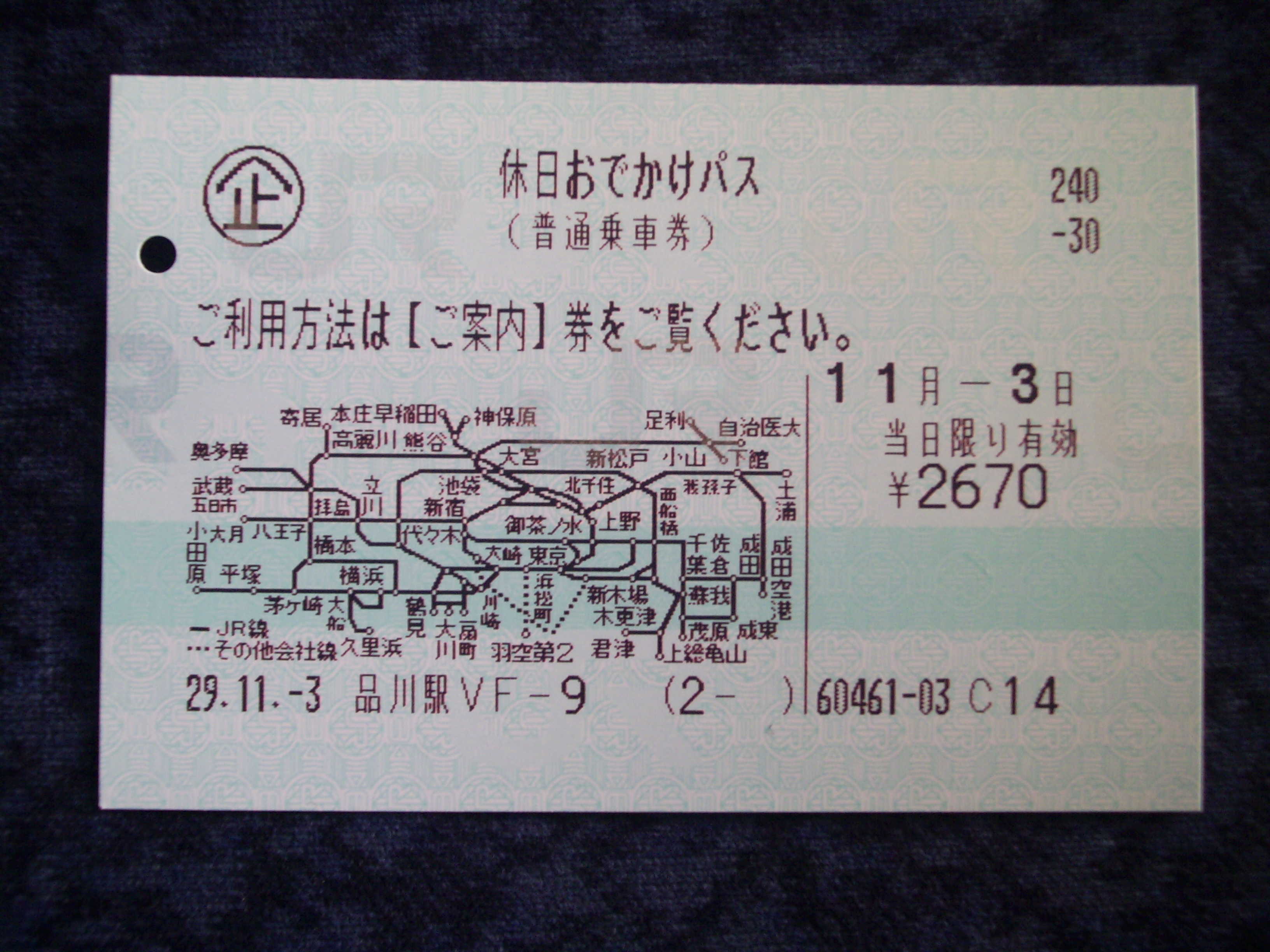 JR東日本の休日おでかけパス㊟カメラを起動すると日付機能が出荷時のものに初期化されるため、ファイル履歴の撮影日時とメタデータの原画像データの生成日時が異なります